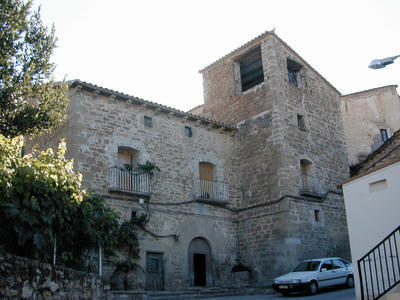 Foto de fachada de la casa torreada Casa Carlos en Abizanda (Huesca)